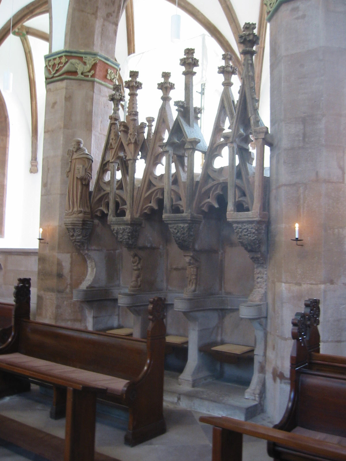 Levitenstuhl Kloster Amgelungsborn, Rotsandstein, späteres 14. Jahrhundert.